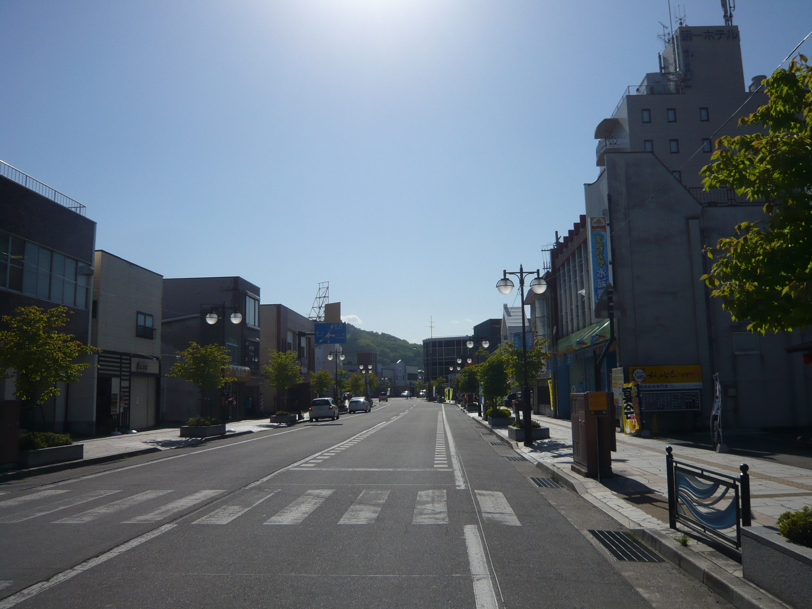 久慈市中心部(2013年5月31日）